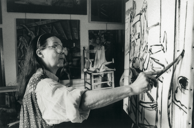 Dolores Puthod mentre dipinge